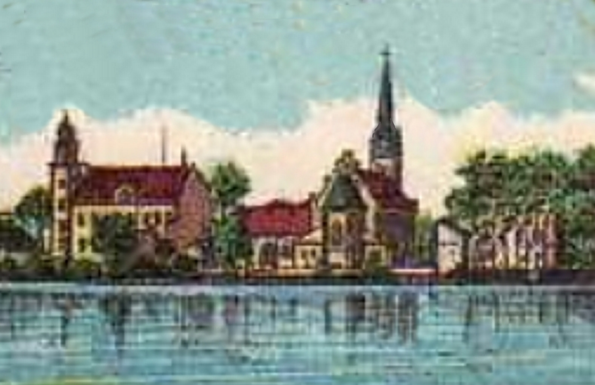 Berlin-Köpenick, Lindenstraße: Kathol. Kirche St. Josef (mit vollst. Turm) und Postamt Köpenick; Ausschnitt einer histor. Postkarte aus dem Jahr 1901